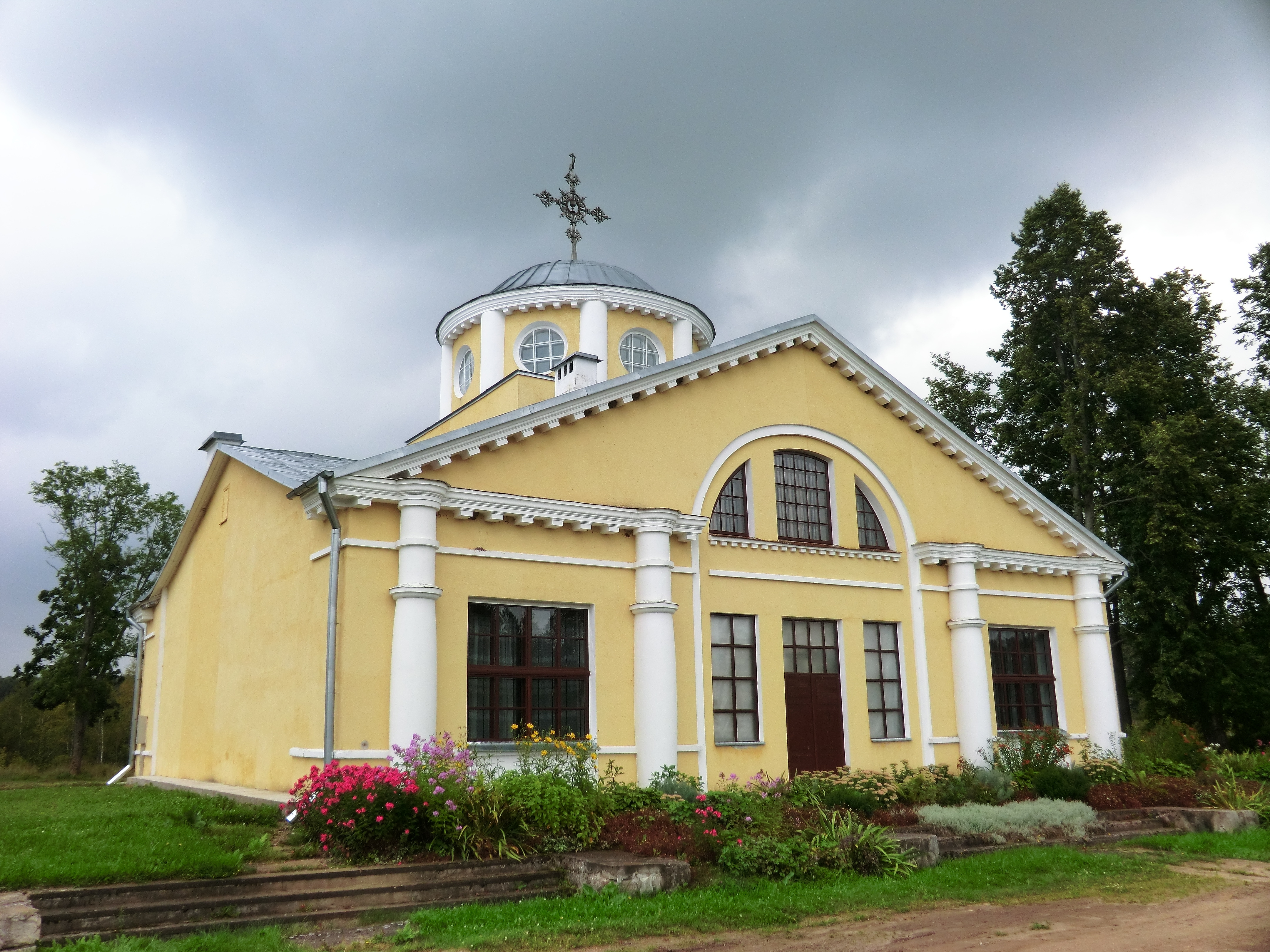 здание бывшей ст. Земгале, теперь католическая церковь (1)